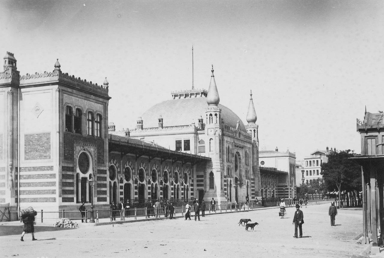 Sirkeci Garı eski görünümüTürkçe: Ansicht des Bahnhof Istanbul Sirkeci in den 1920er-Jahren